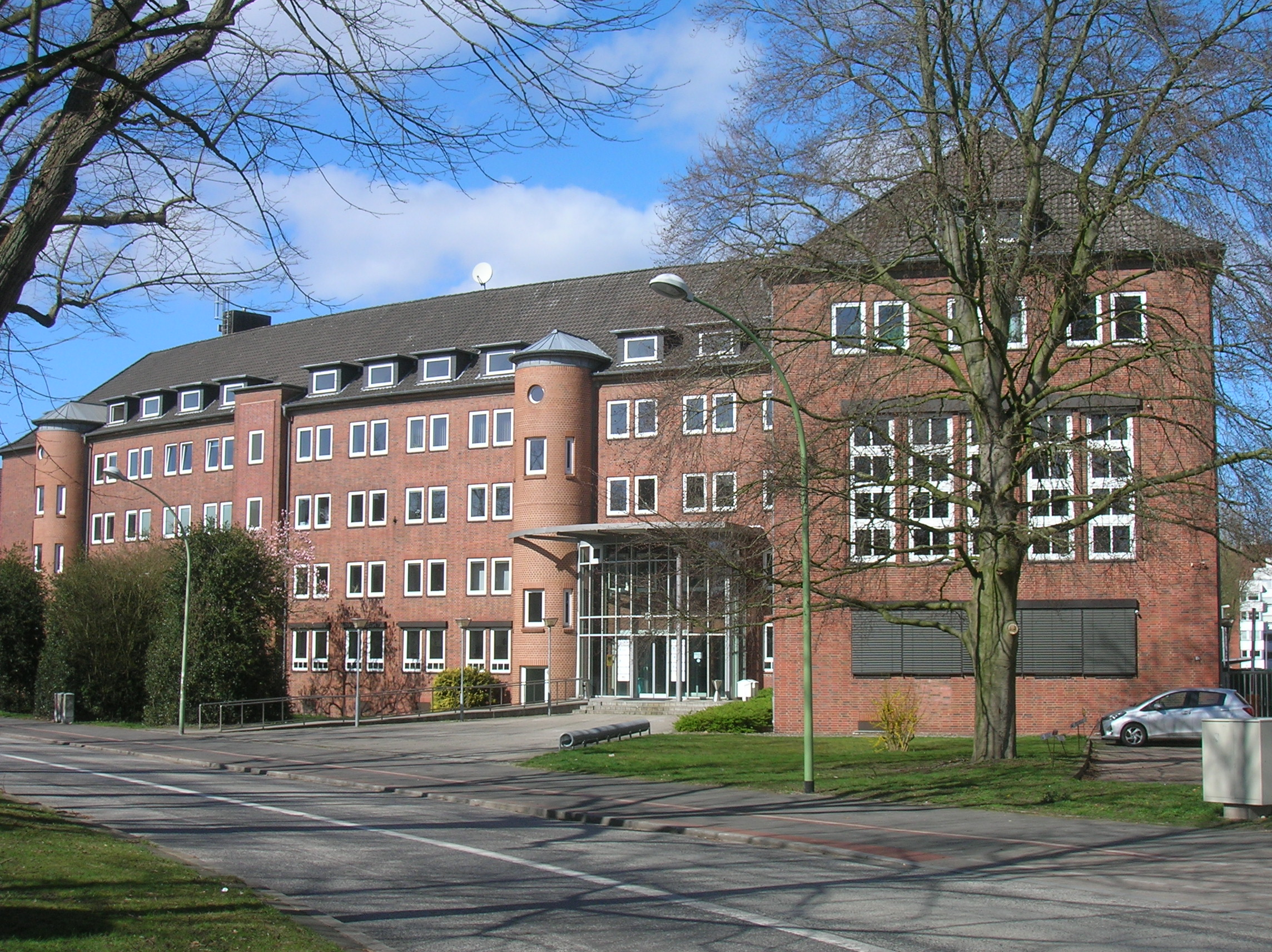 Hauptgebäude und Eingang des ehemaligen Arbeitsamts Bremerhaven an der Friedrich-Ebert-Straße in Geestemünde